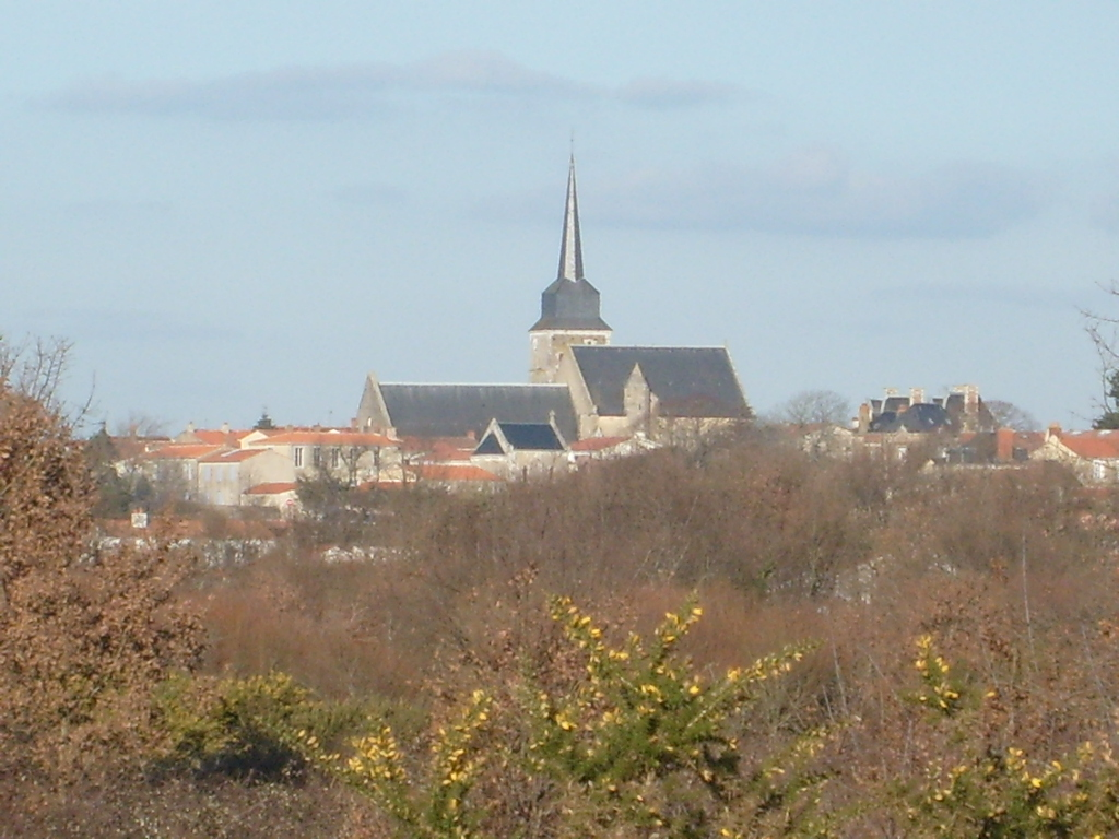 Vue du bourg d'Olonne-sur-mer (Vendée).